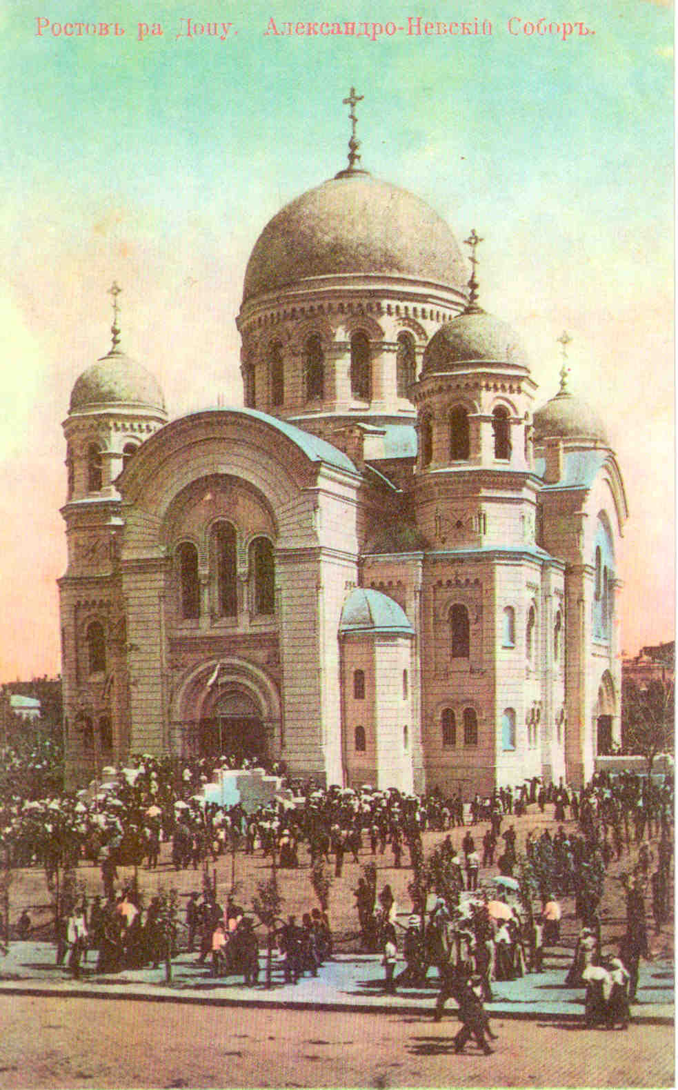 Александро-Невский собор, Ростов-на-Дону